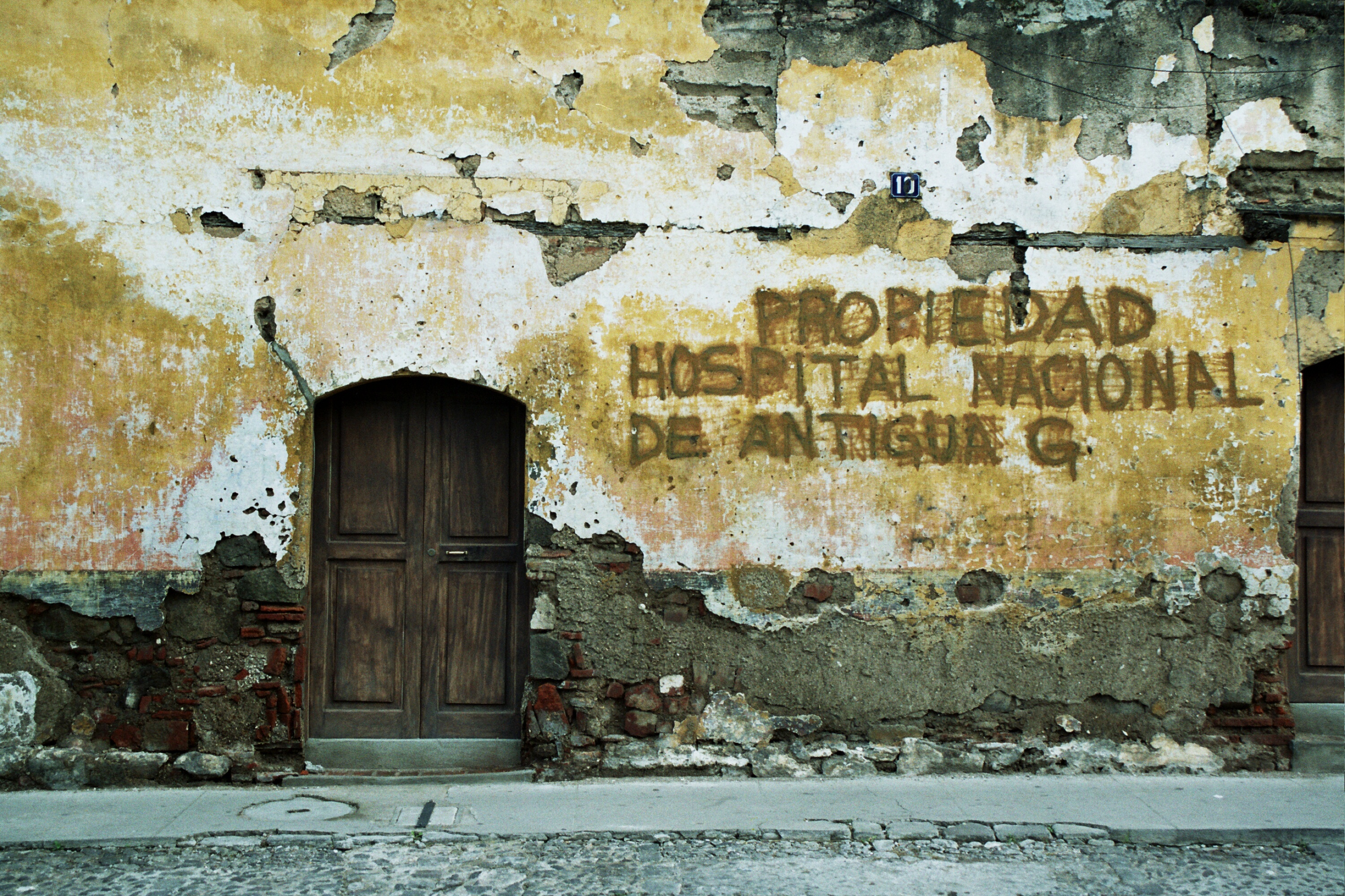 ehemaliges Krankenhaus in Antigua Guatemala, deutsch Alt-Guatemala ("Eigentum des nationalen Krankenhauses von Antigua G.")